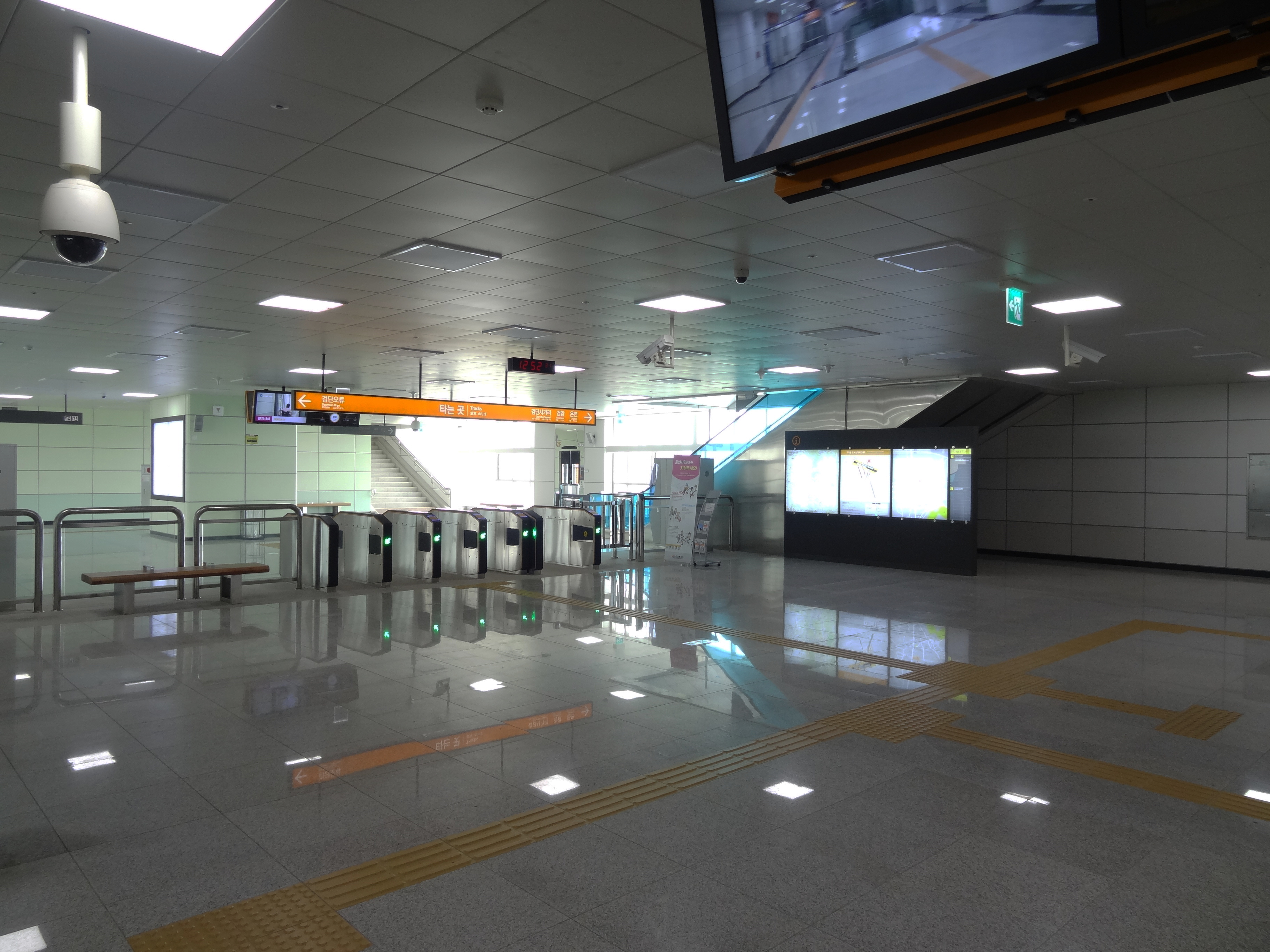 왕길역 개찰구.